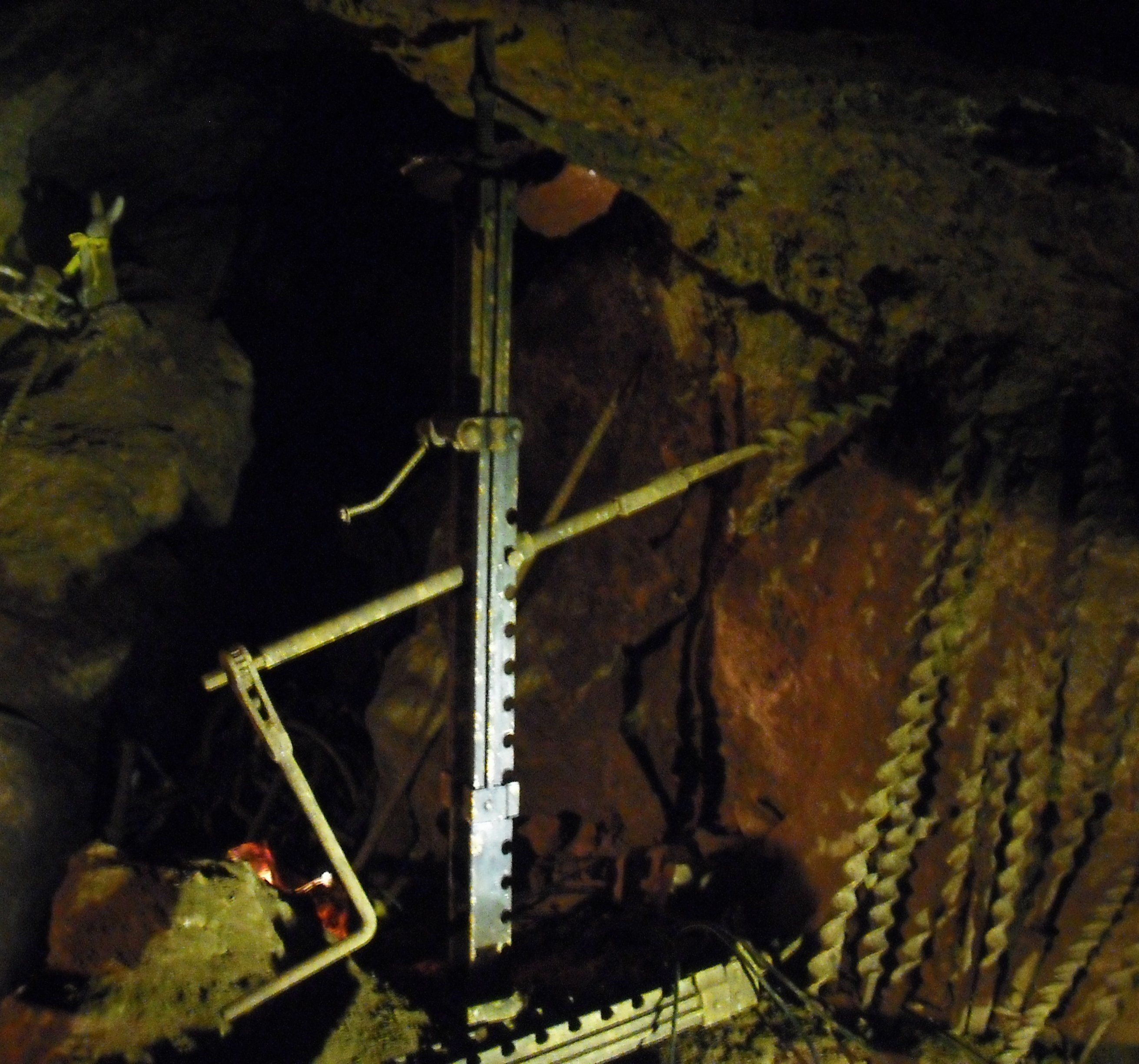 Hand-cranked ratchet rock drill